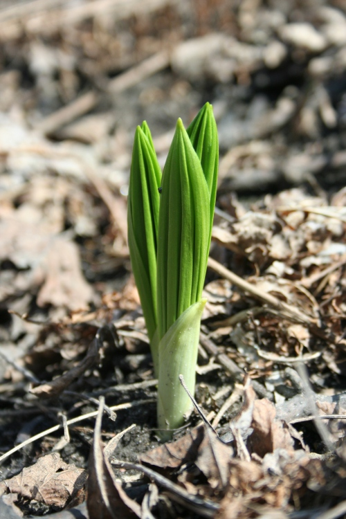 Pousses de Veratrum viride au printemps, rives de la rivière St-Charles, Québec.